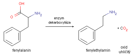 Reakční schéma enzymatické dekarboxylace fenylalaninu na fenylethylamin Autor: Antonín Vítek, email: avitek(at)lib(dot)cas(dot)cz